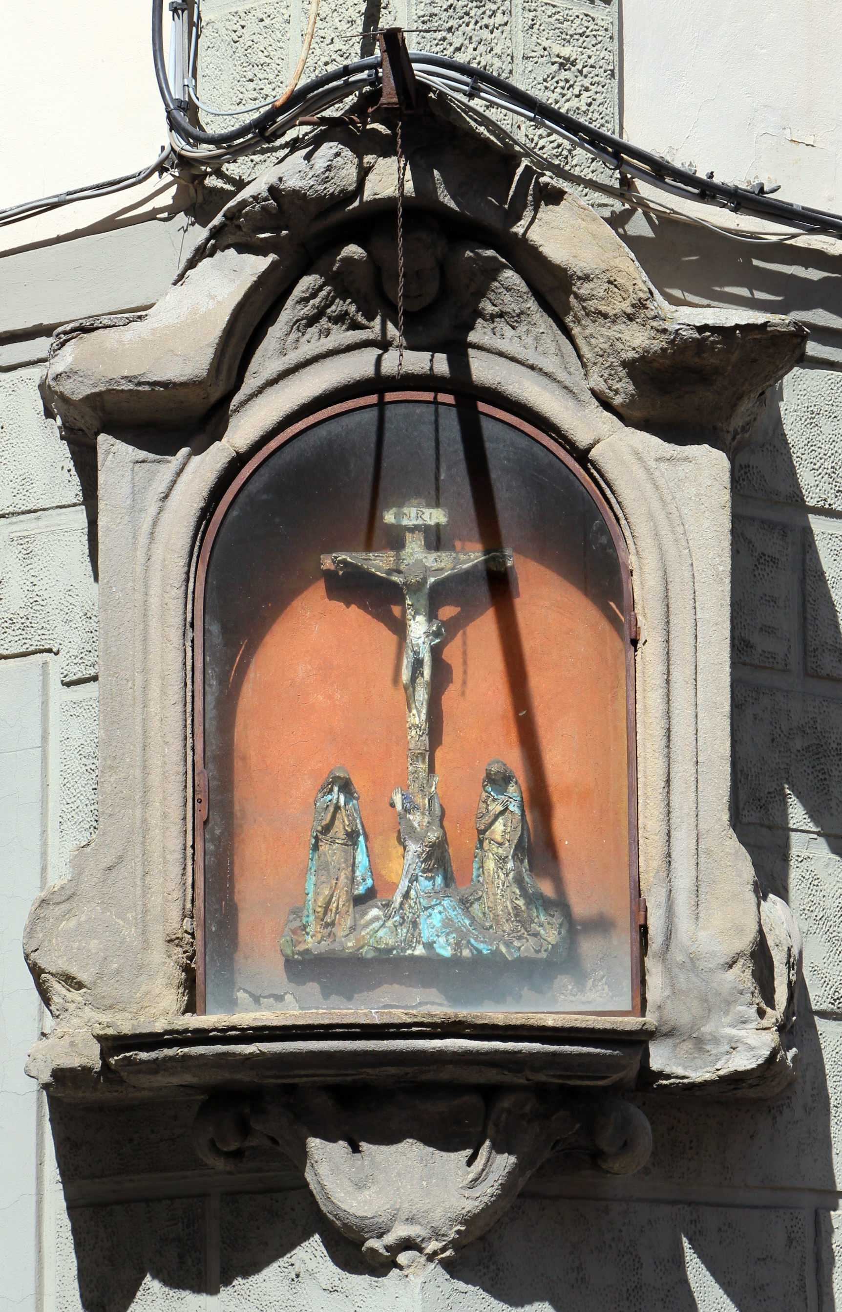 Via Alfani